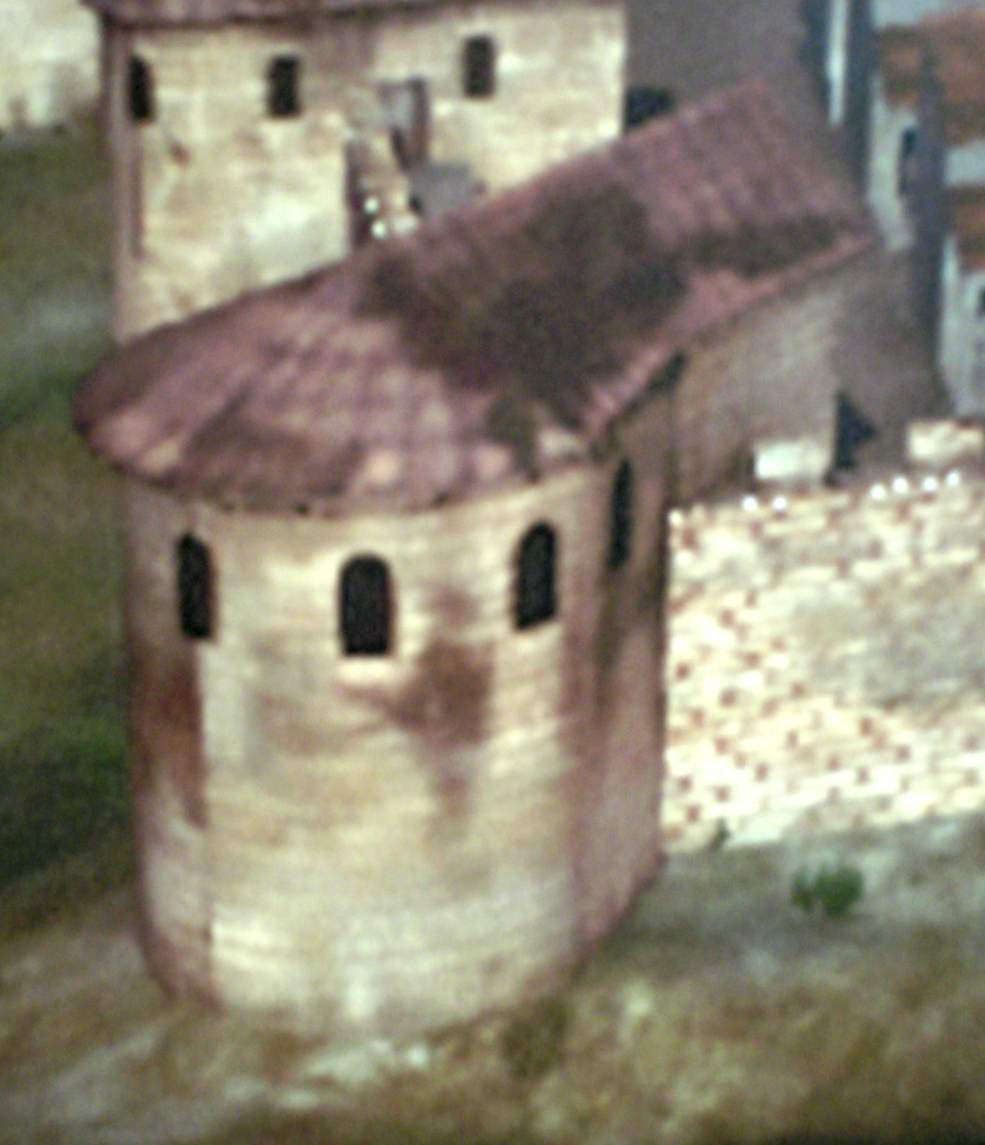 Rekonstruktionszeichnung des NO Fächerturms von Kastell Cannabiaca, Zeiselmauer/Österreich, Zustand im 4. Jahrhundert n.Chr.